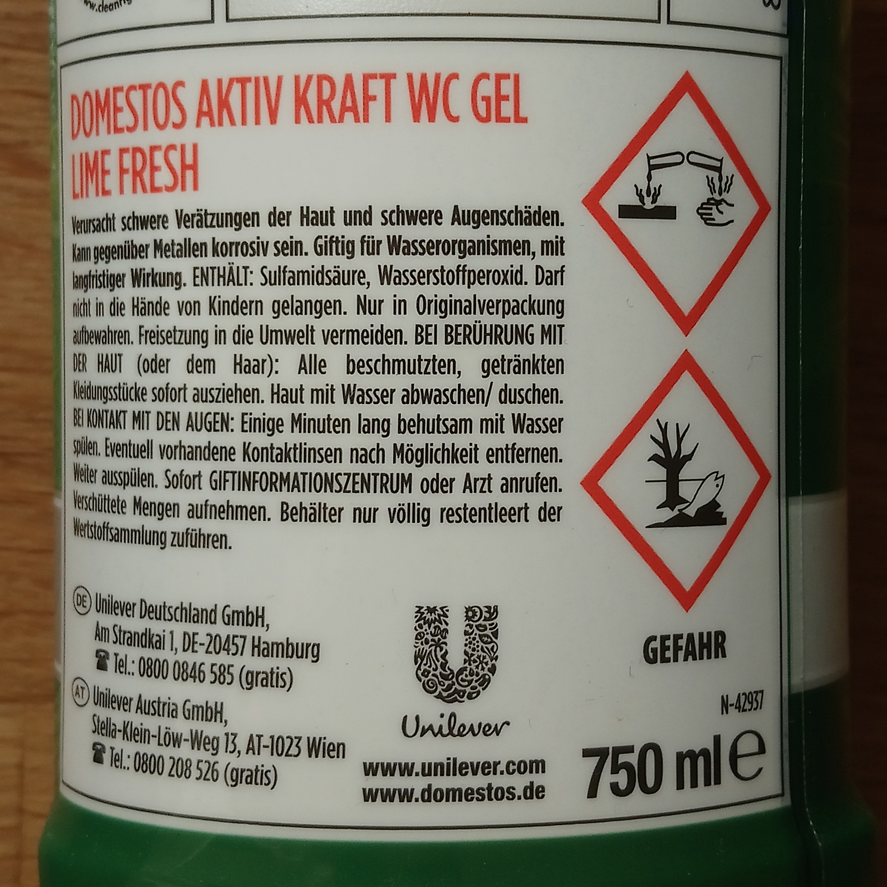 Warning GHS symbols on the Domestos bottle